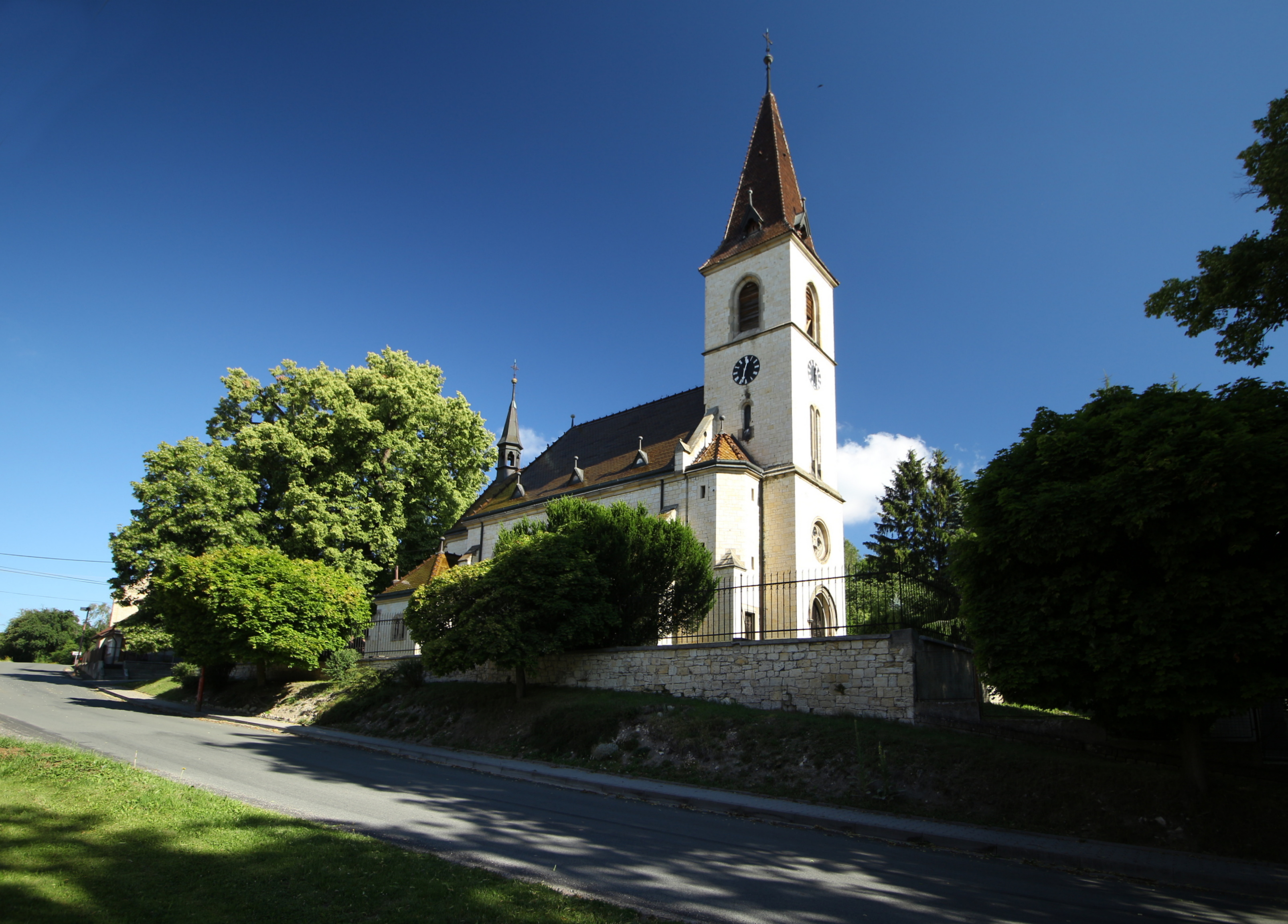 Kroučová